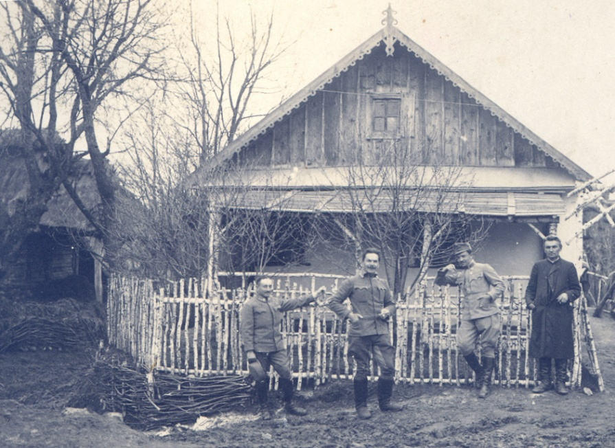 Отець Григорій Косар (1867-1918) (крайній справа), парох сіл Ратищі і Чистопади. Світлина періоду Першої світової війни. Село Чистопади Зборівського району Тернопільської області.